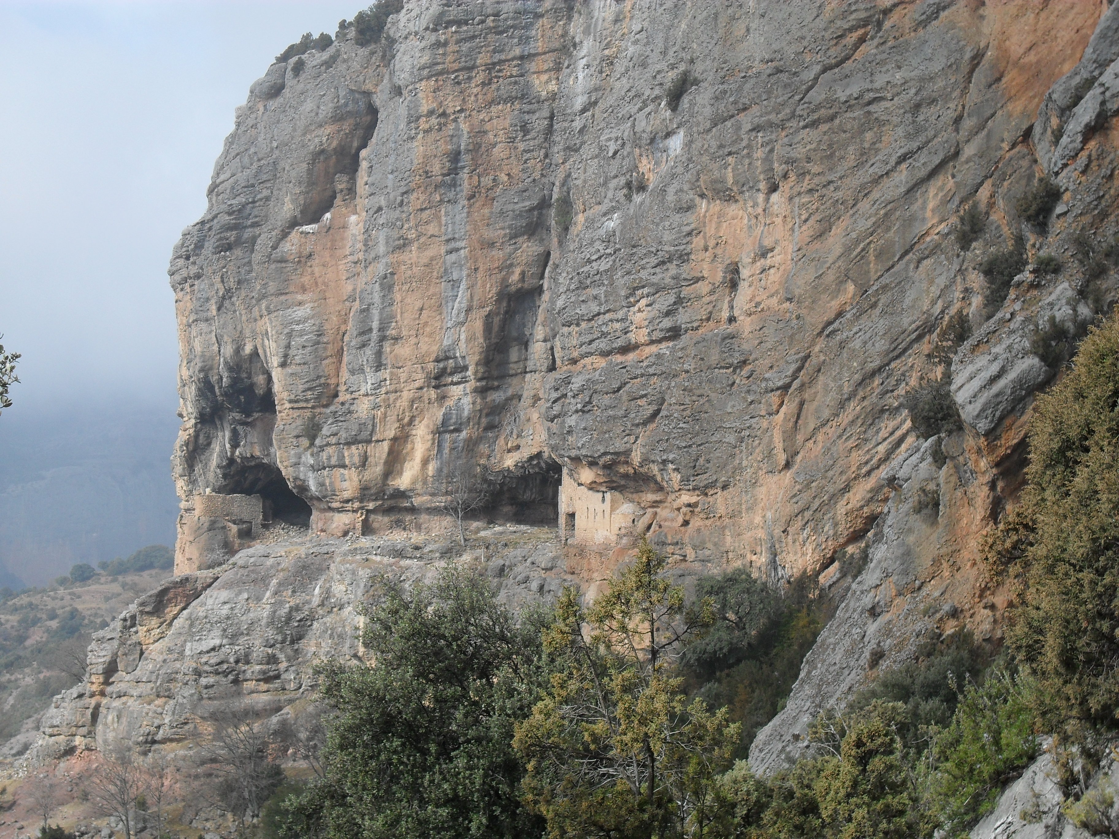 Espluga de Cuberes a la Reserva nacional de caça del Boumort